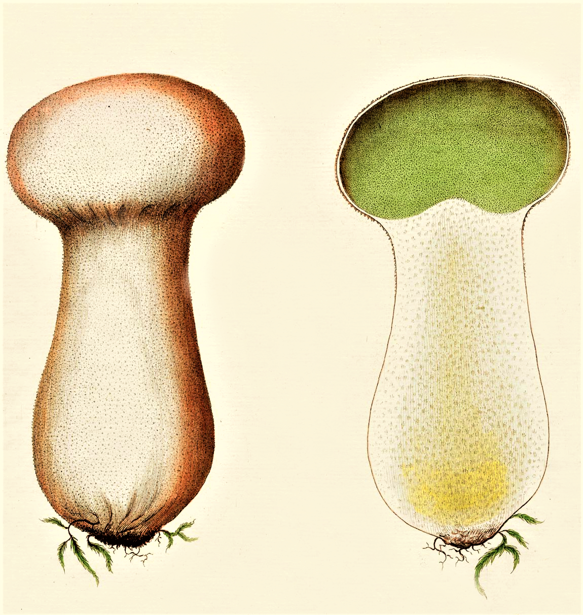 Martin Vahl: Lycoperdon saccatum Vahl (1794), heute Lycoperdon excipuliforme (Scop., 1772) Pers. (1801)